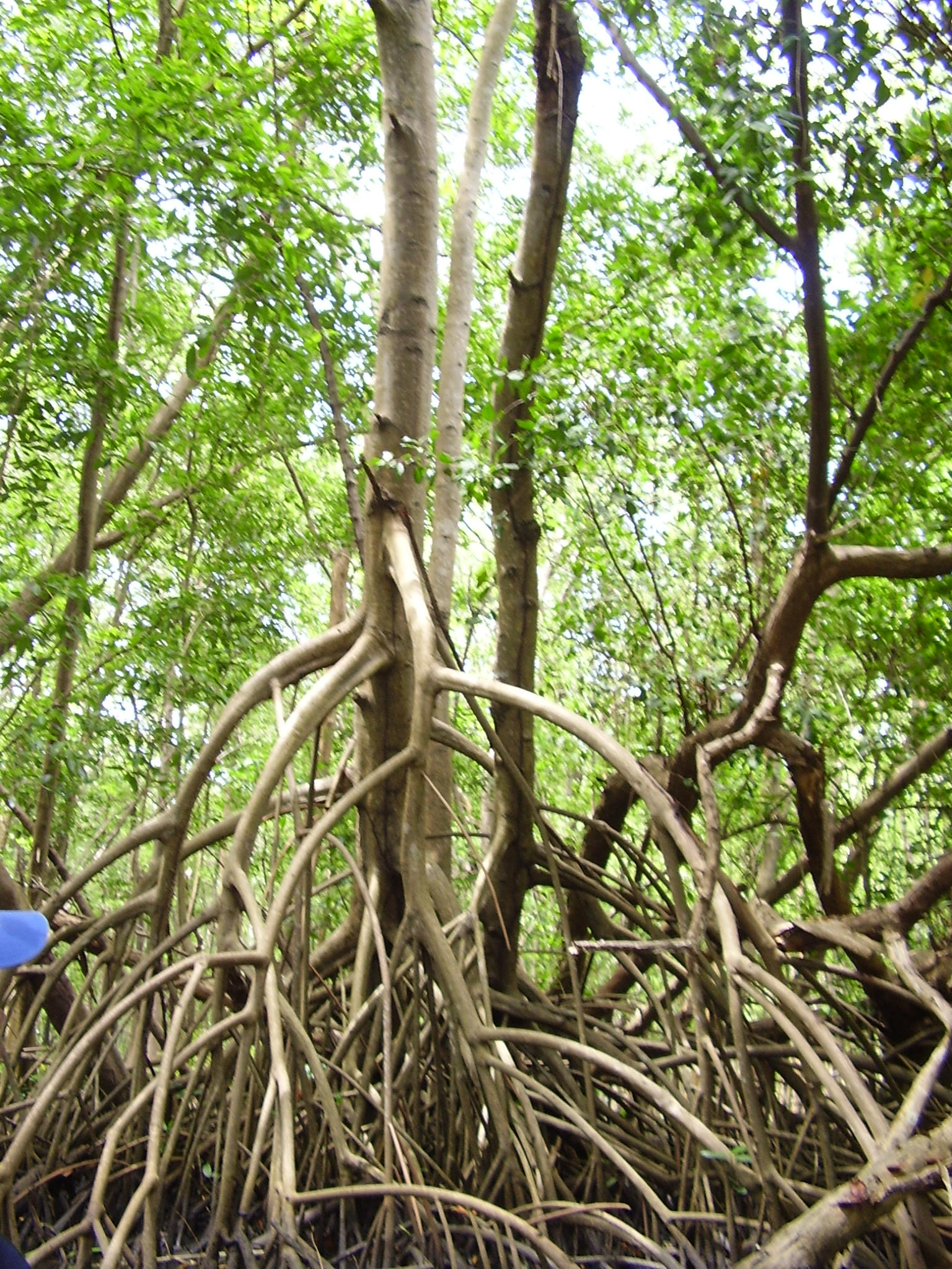 Photo d'un palétuvier de la Mangrove de Rivière-Salée en Martinique.